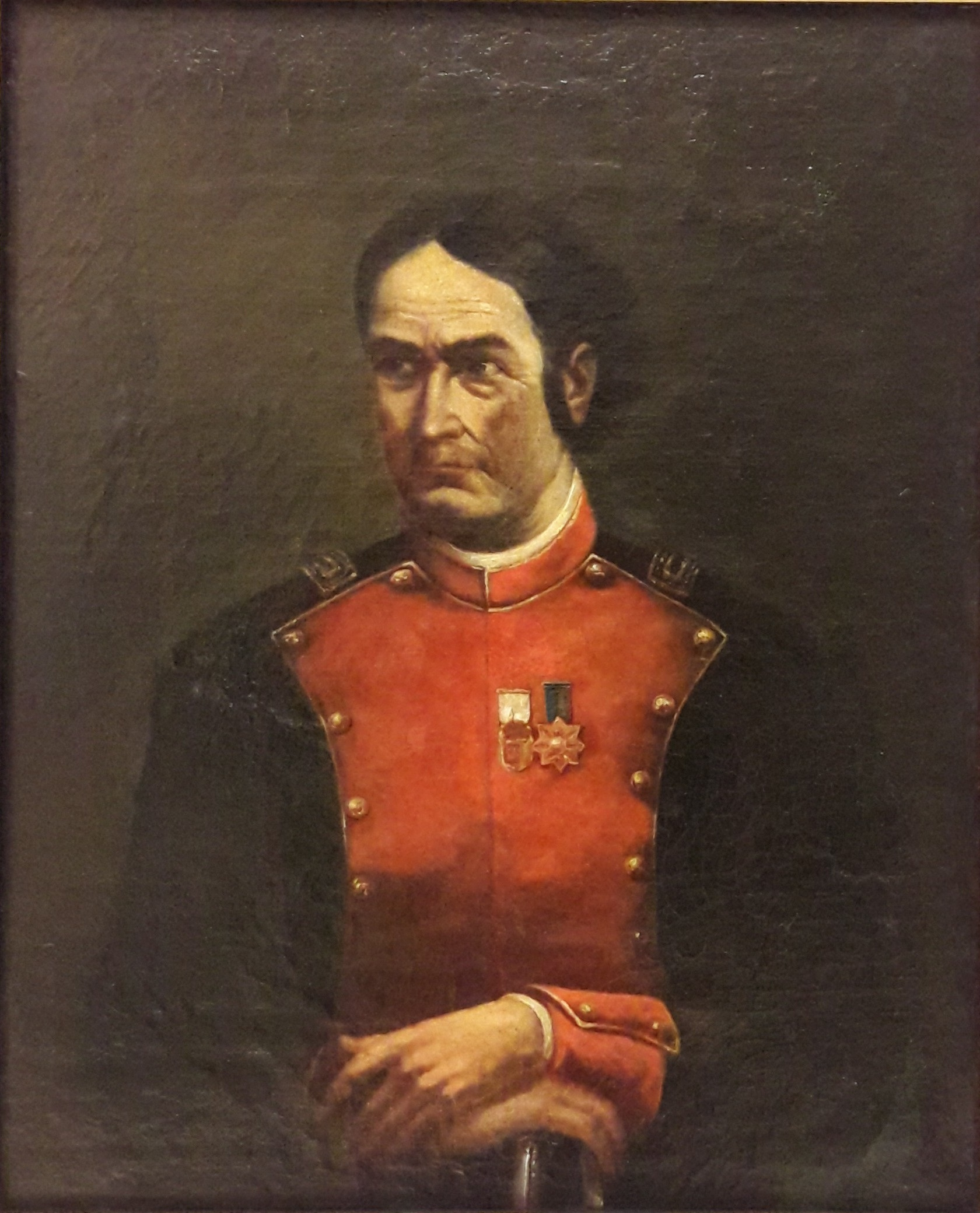 Museo Histórico Nacional - Juana Azurduy. Óleo sobre tela. Autor desconocido.